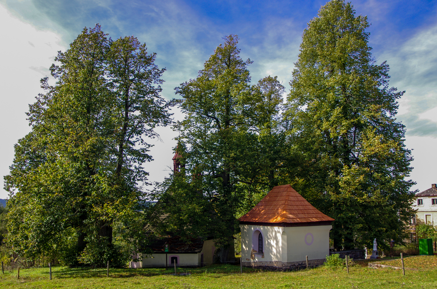 památné stromy Sněženské lípy ve Sněžné u Kraslic, okres Sokolov